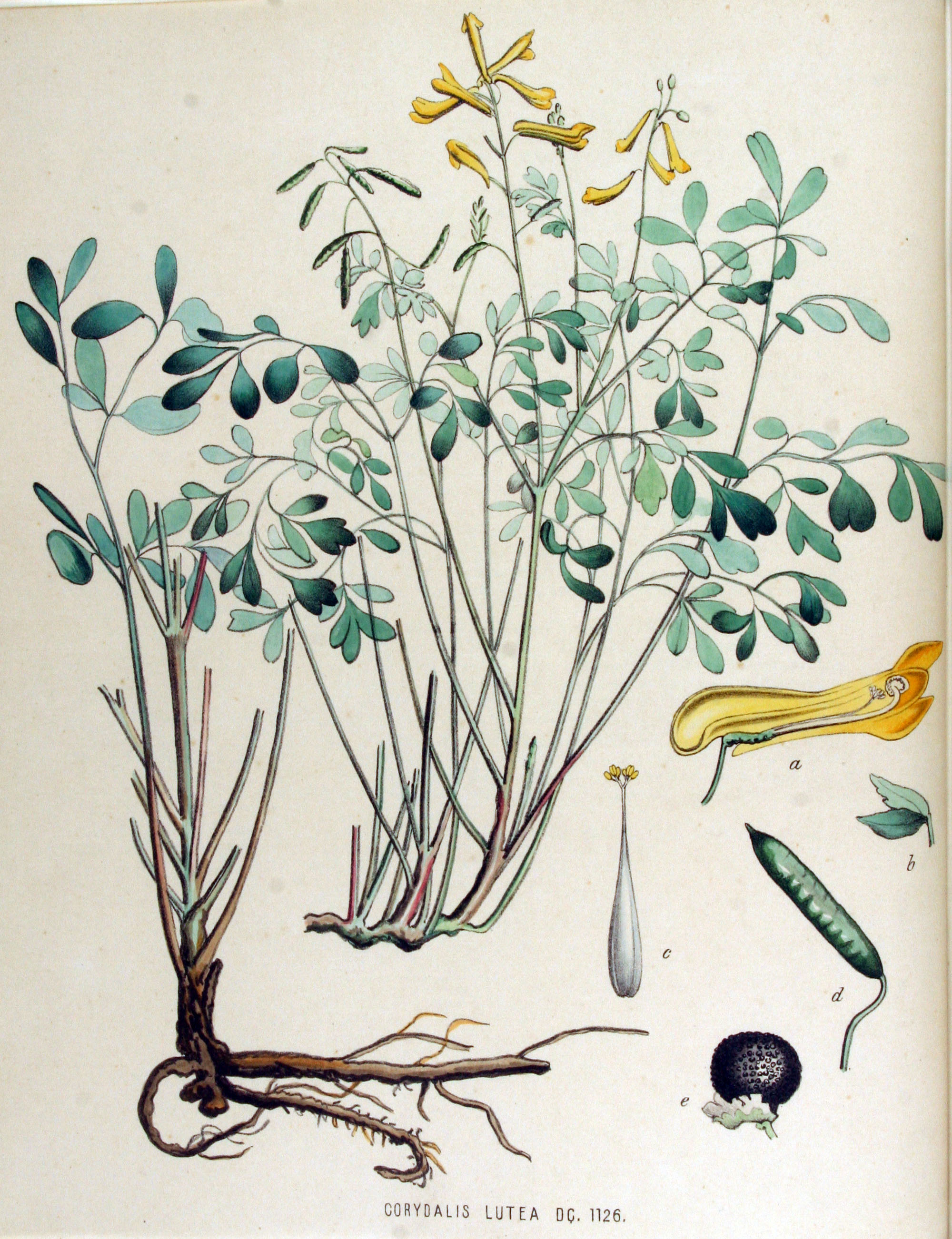 Pseudofumaria lutea (L.) Borkh. (Syn. Corydalis lutea (L.) DC.)